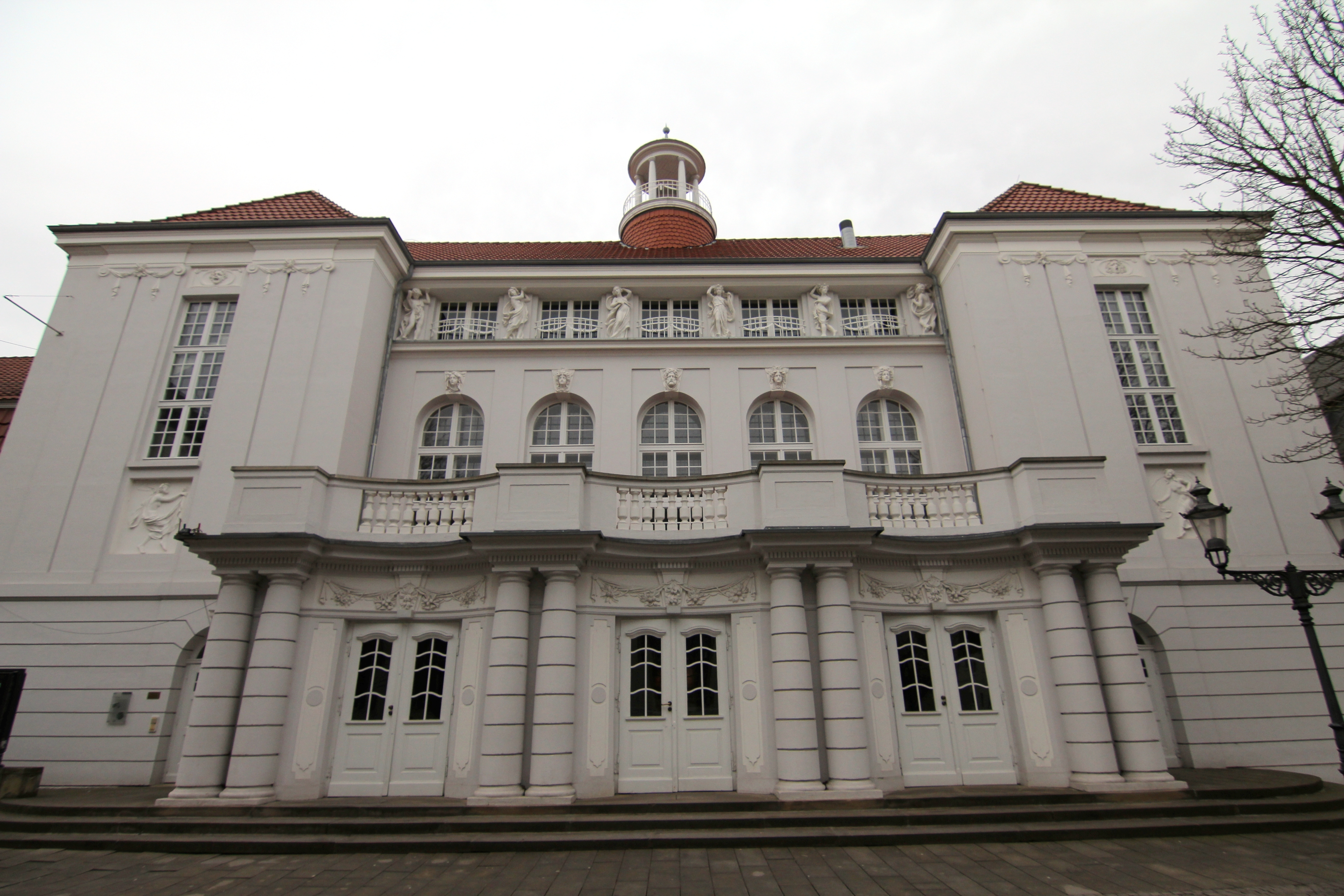 Die suidaansig en ingang na die Stadttheater Minden, 'n munisipale teater in Minden, Noordryn-Wesfale, Duitsland